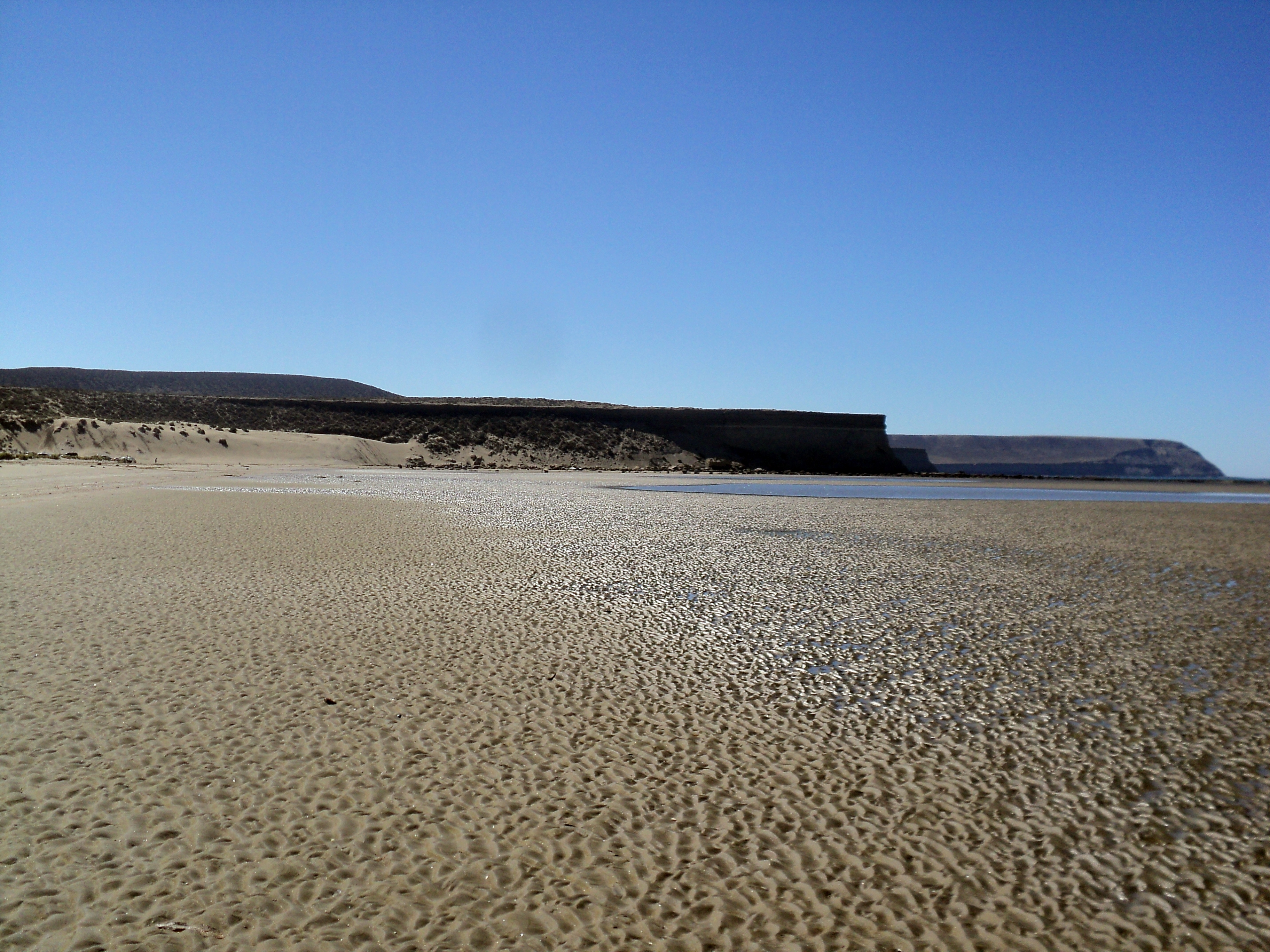 Vista desde la playa Los Límites hacia la herradura y Punta del Marqués